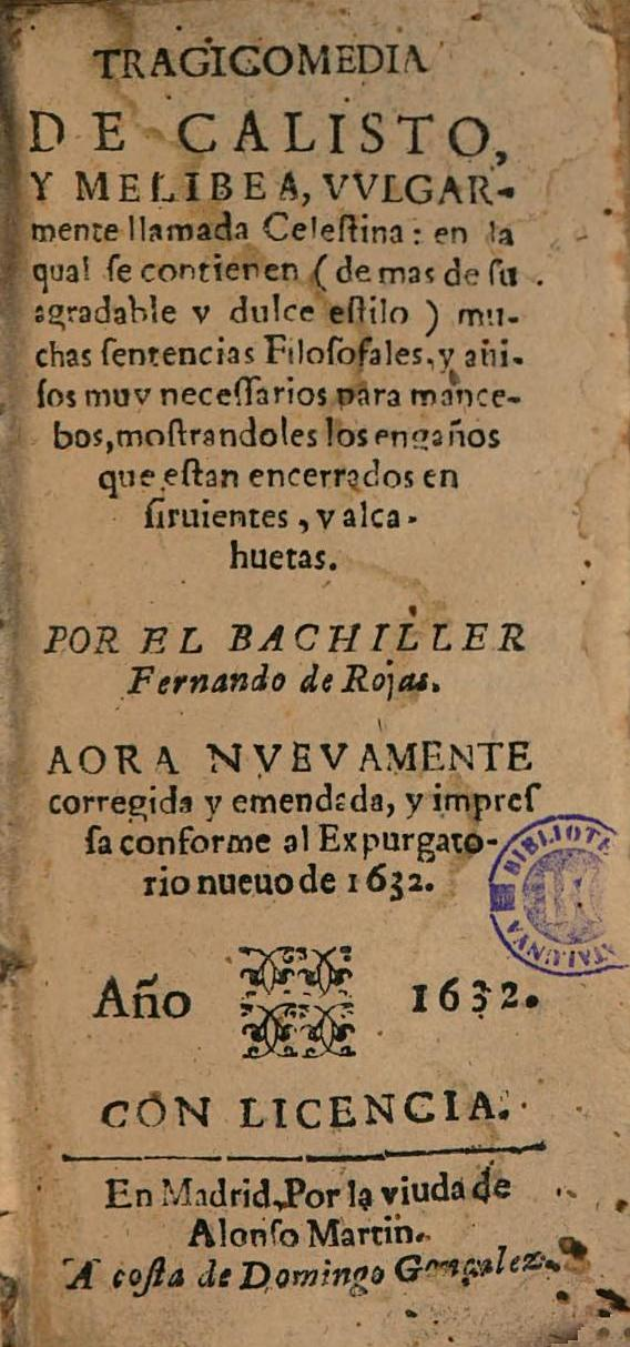 Portada de la edición expurgada de 1632